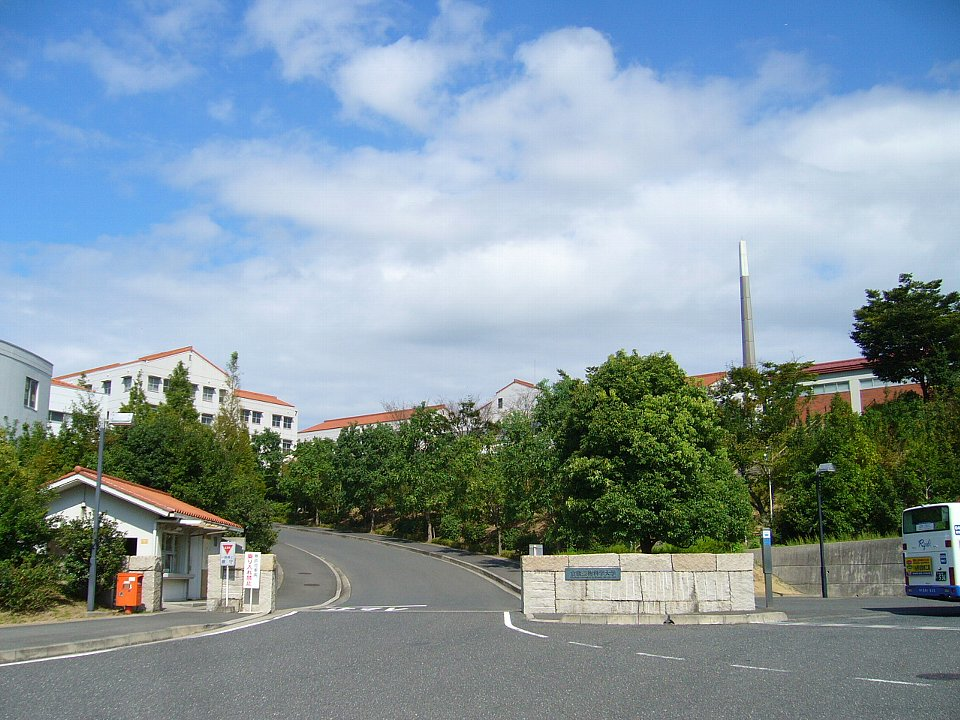 倉敷芸術科学大学 2006年9月19日Bakkai撮影